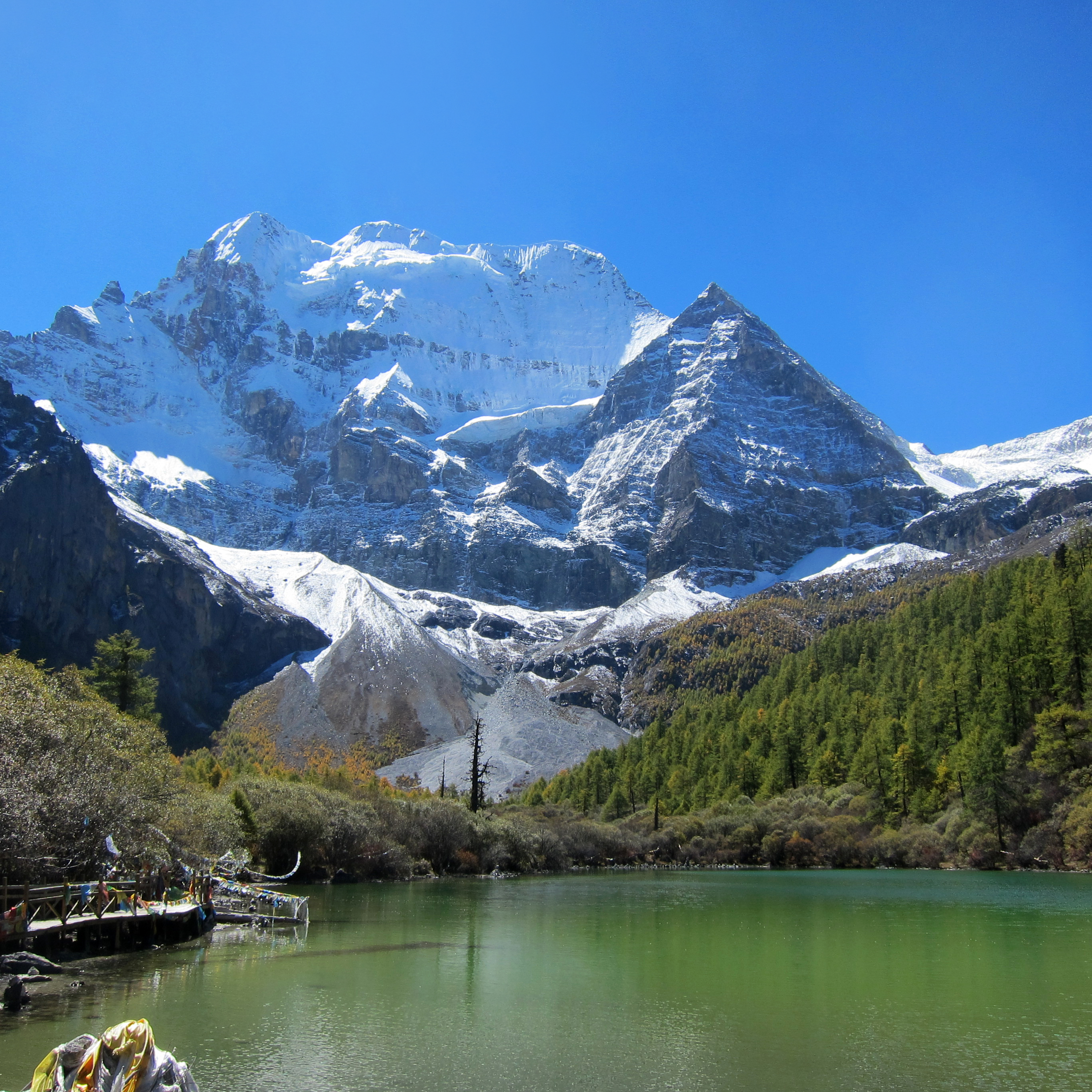 Yading